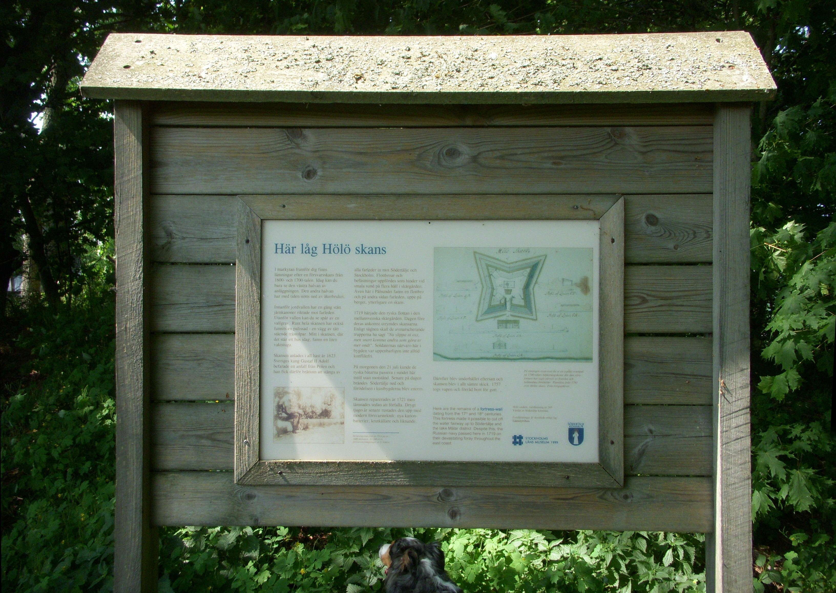 Hölö skans, infotavla